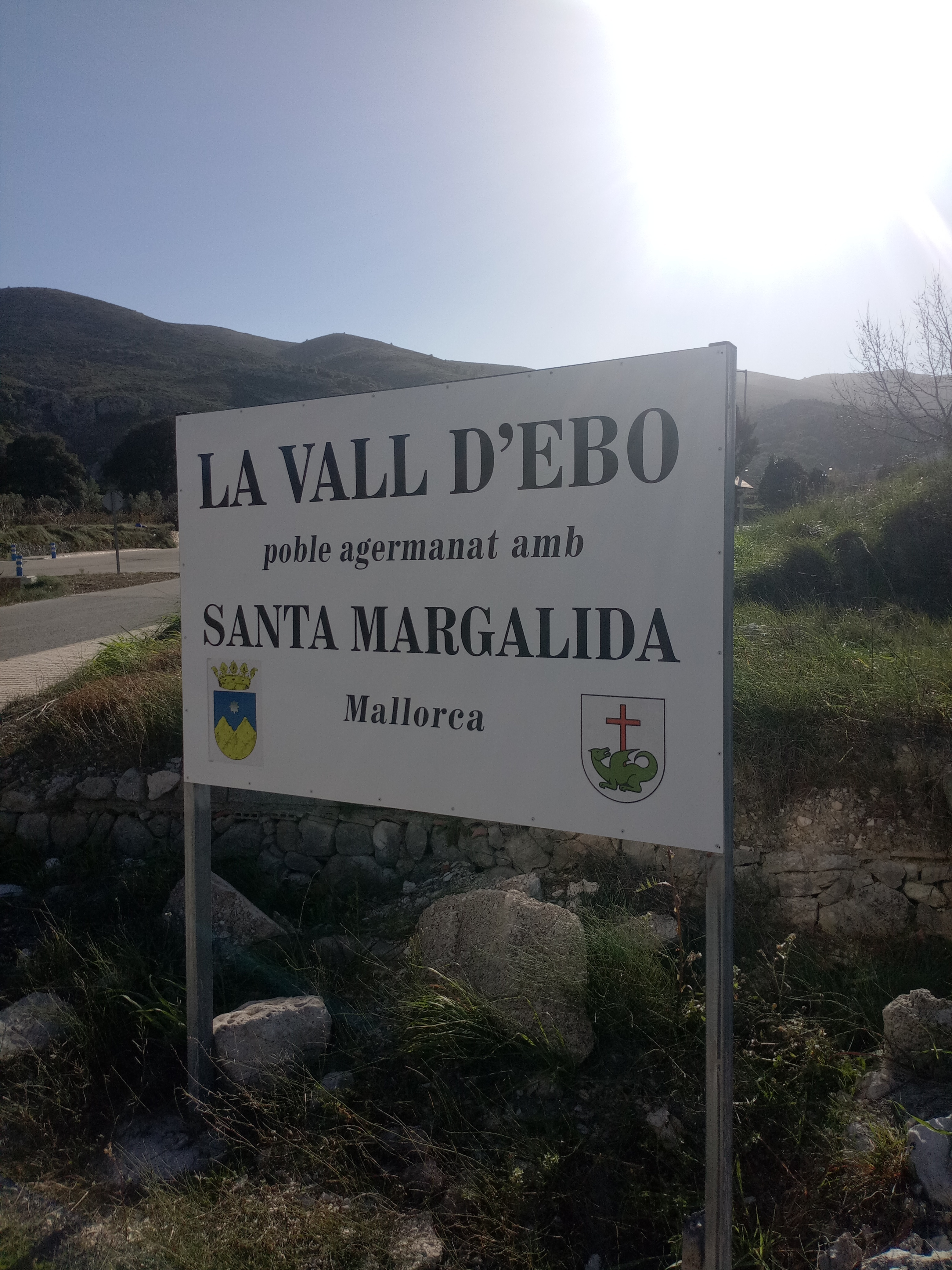 Cartel de hermanamiento entre la Vall d'Ebo y Santa Margalida.